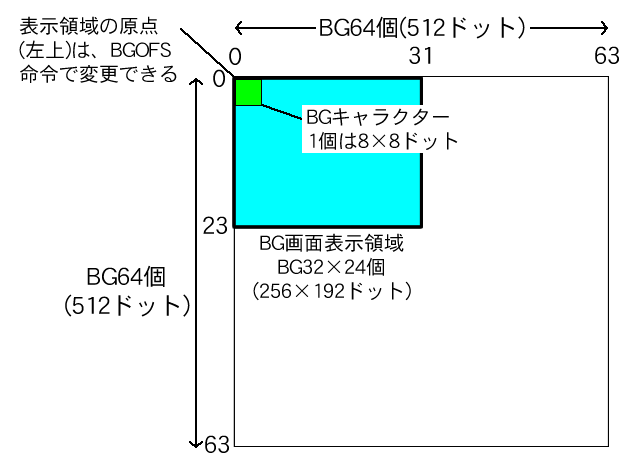 プチコンのBG画面レイアウトの説明図